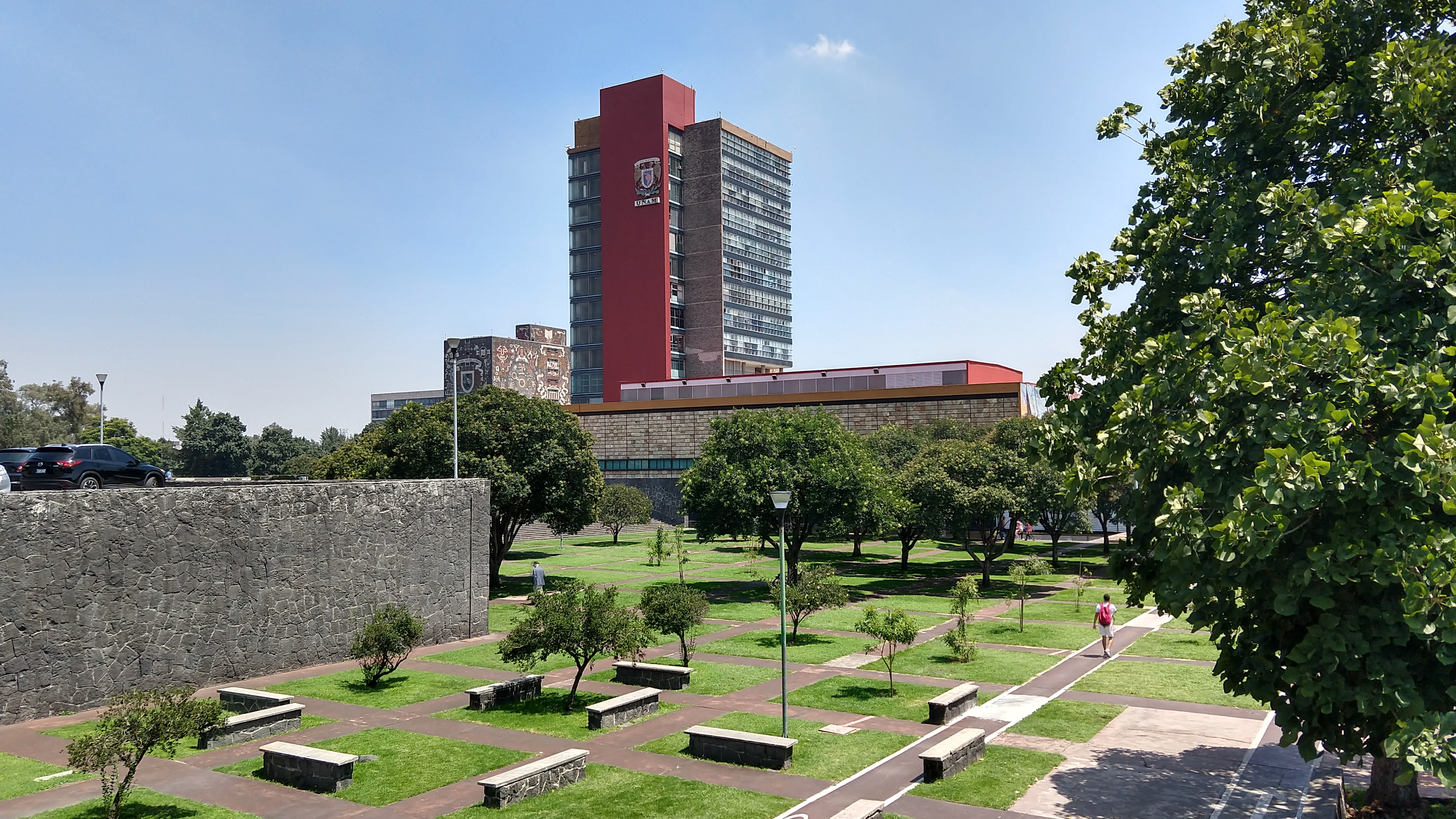 Rectoria de la UNAM, en Ciudad Universitaria.